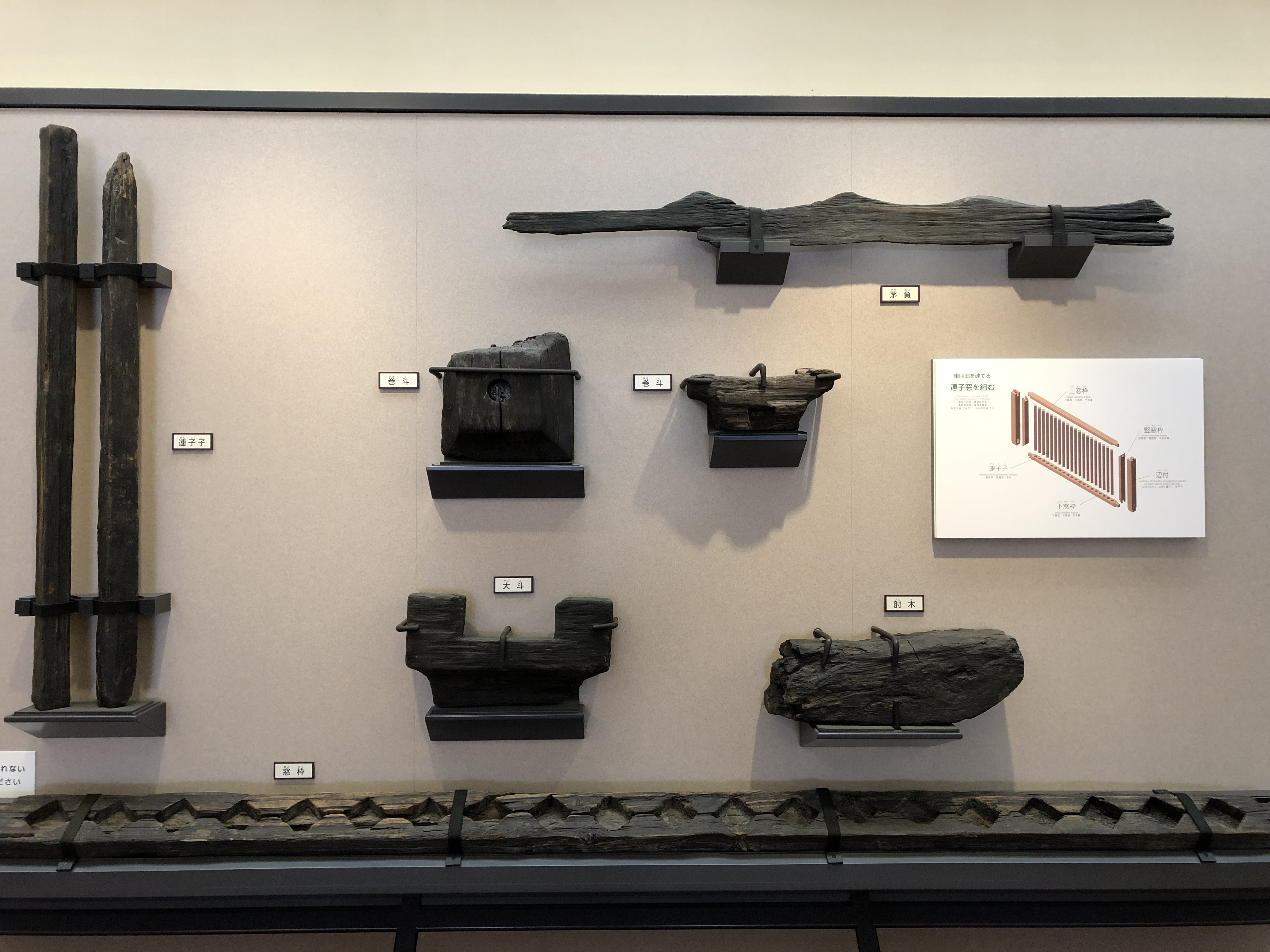 山田寺跡出土品、東回廊部材 (飛鳥資料館展示)